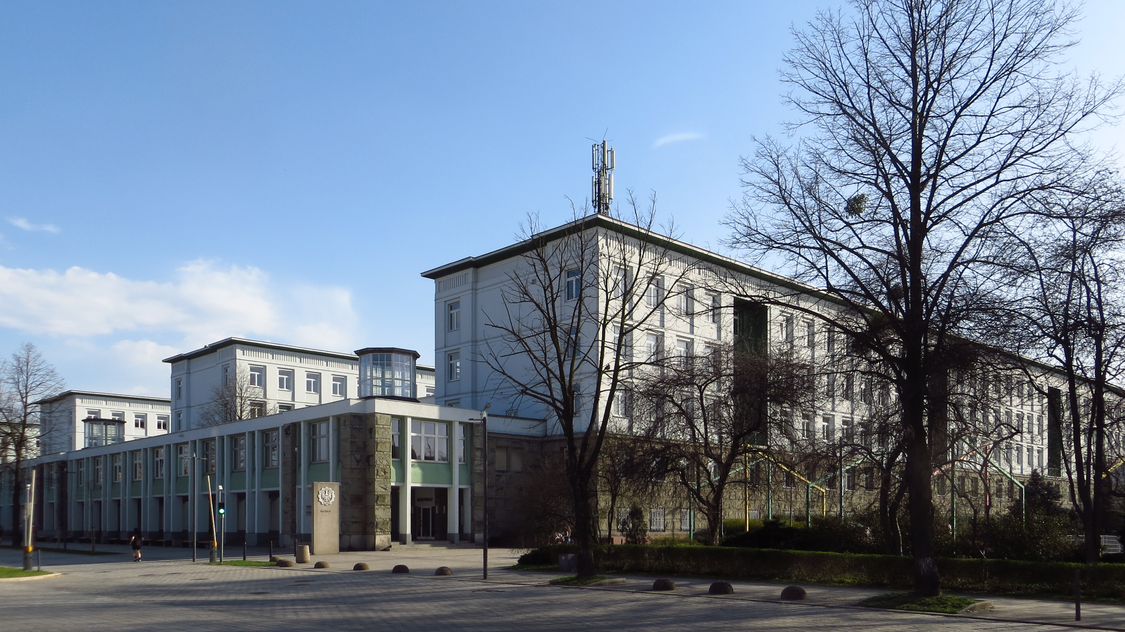 Budynek Wydziału Górnictwa i Geologii Politechniki Śląskiej